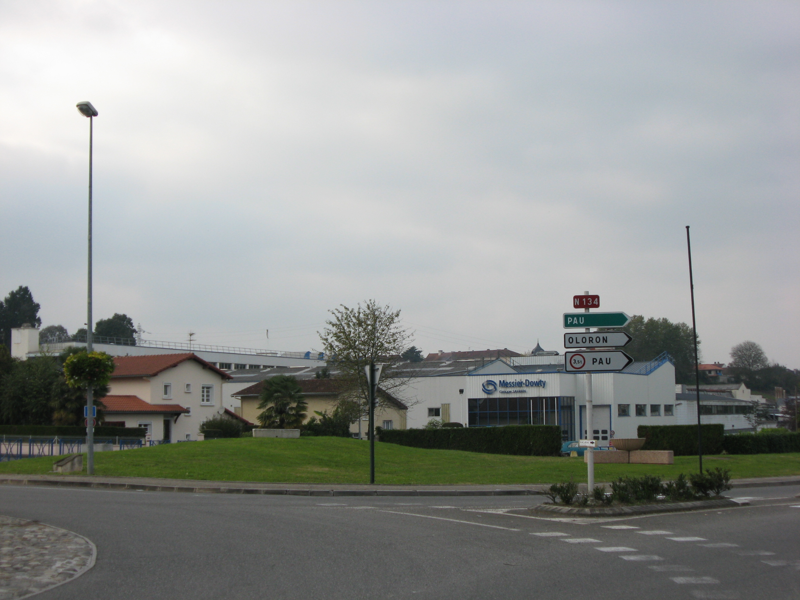 Vue de l'usine Messier-Downty à Bidos (Pyrénées Atlantiques) Pyrénées).